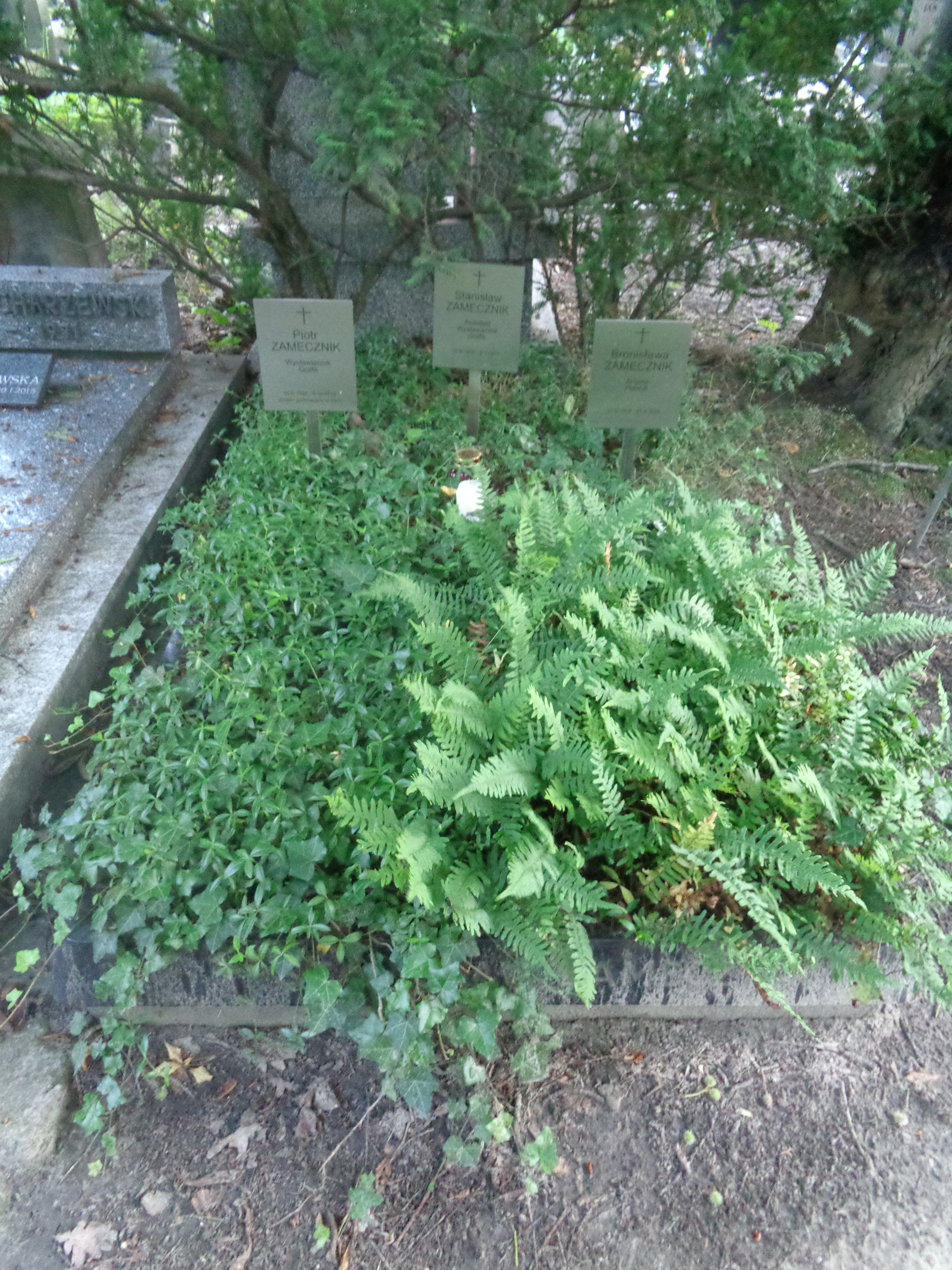 Grób Stanisawa Zamecznika na Cmentarzu Wojskowym